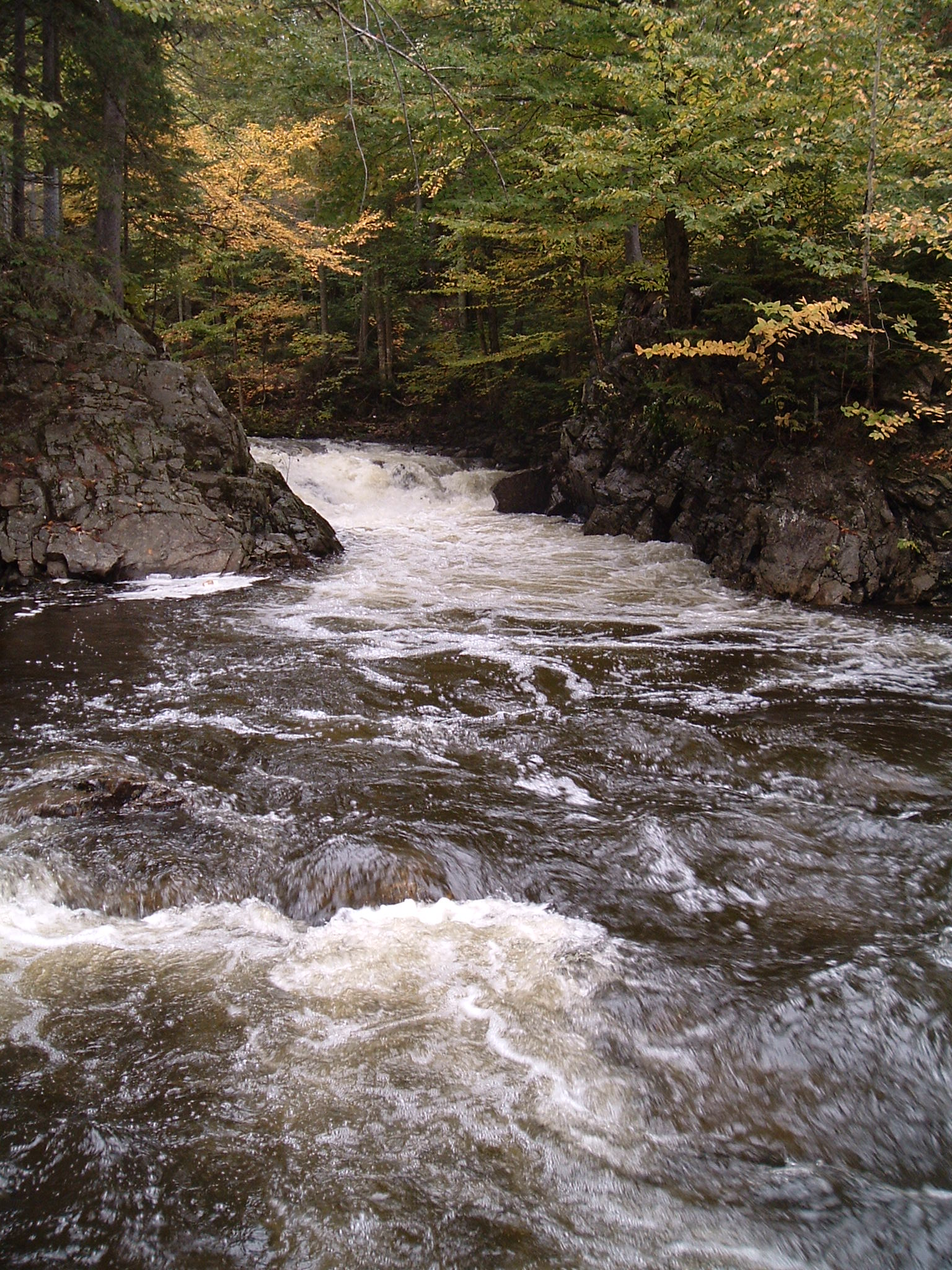 Rivière Jaune, municipalité de Lac-Beauport (Québec)